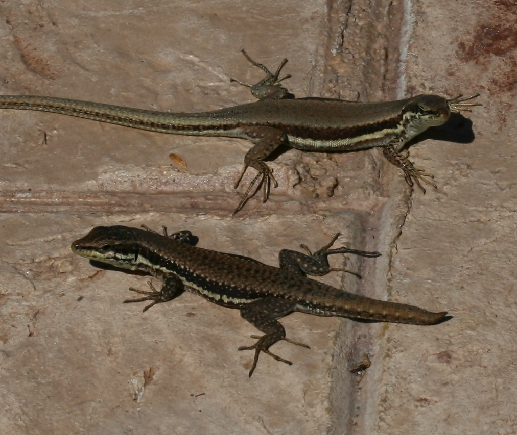 Argaka, Cyprus